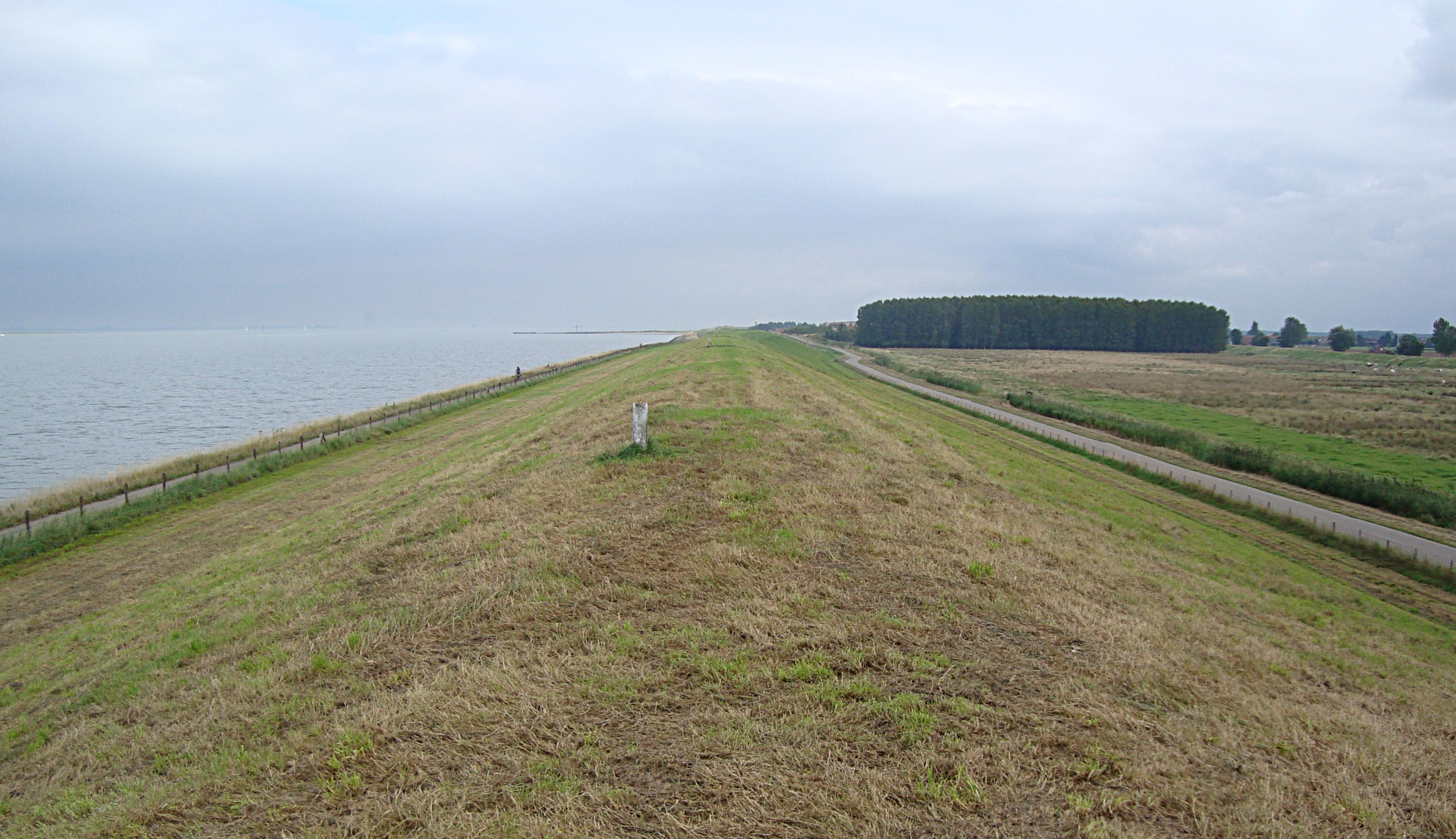 Digue de polderisation dans les environs de Hoofdplaat en Flandre zélandaise (Pays-Bas).